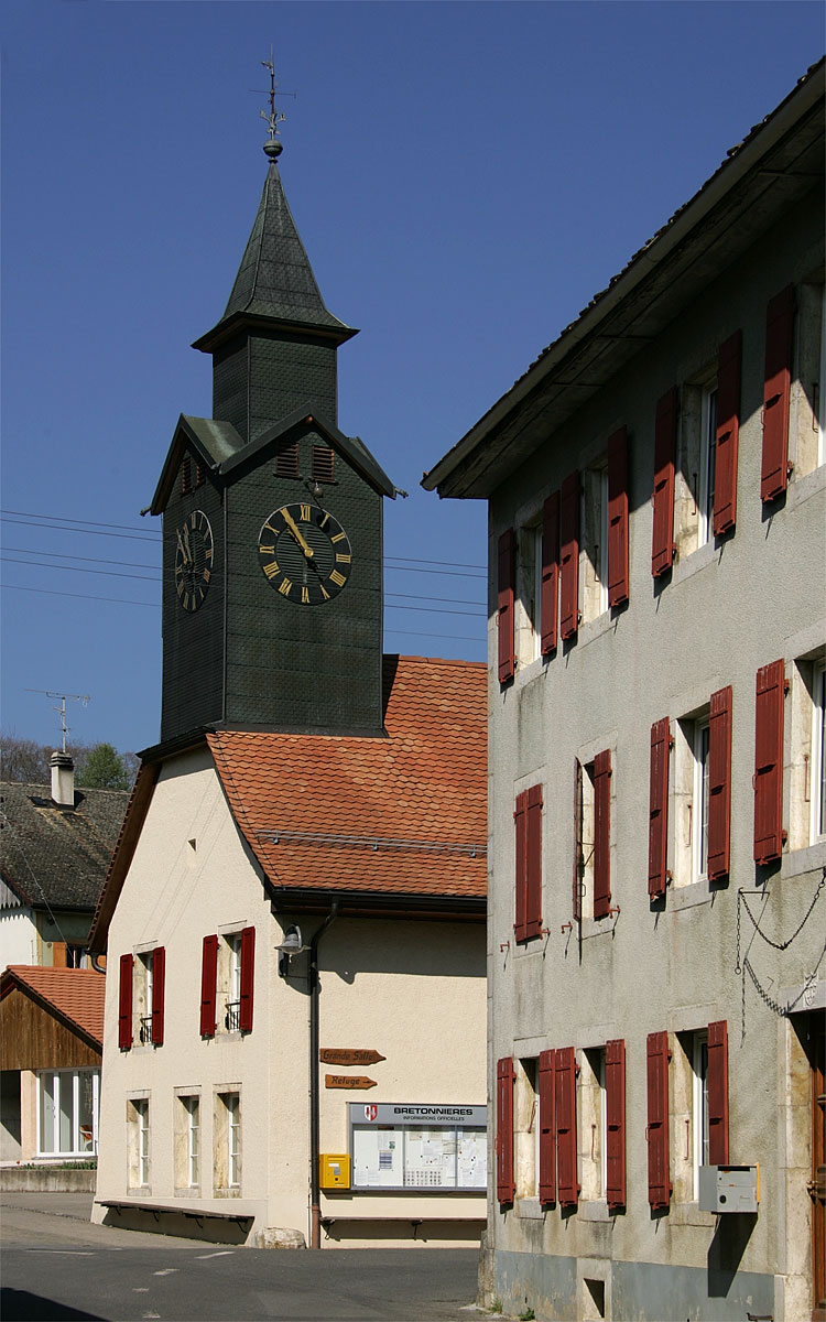 Im Zentrum von Bretonnières